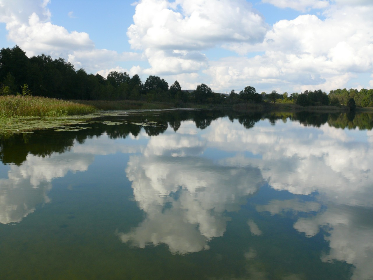 Табашино озеро, Оршанский район. This image is related to the protected area of Russia number 1210059